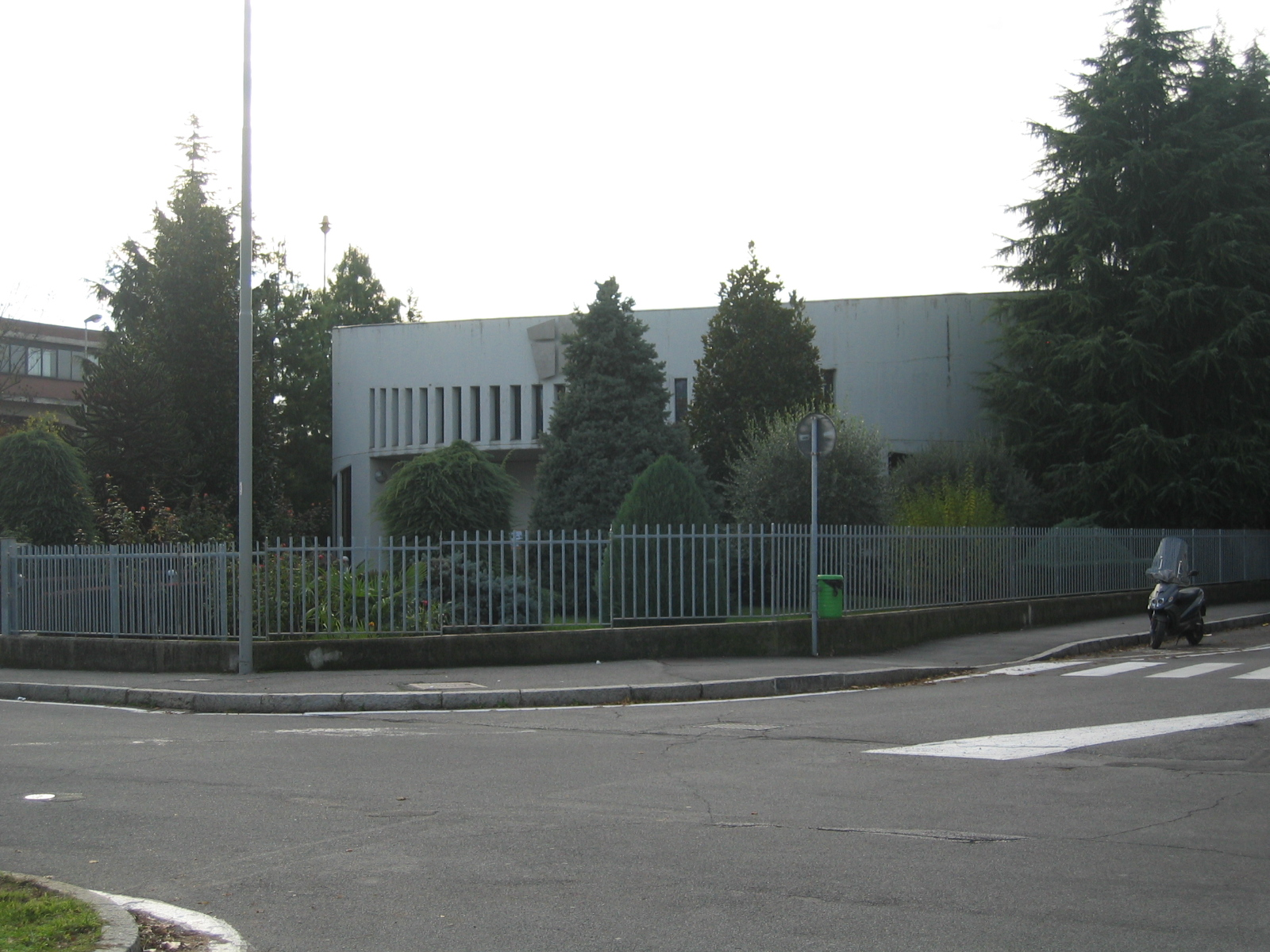 La chiesa del Conventino.